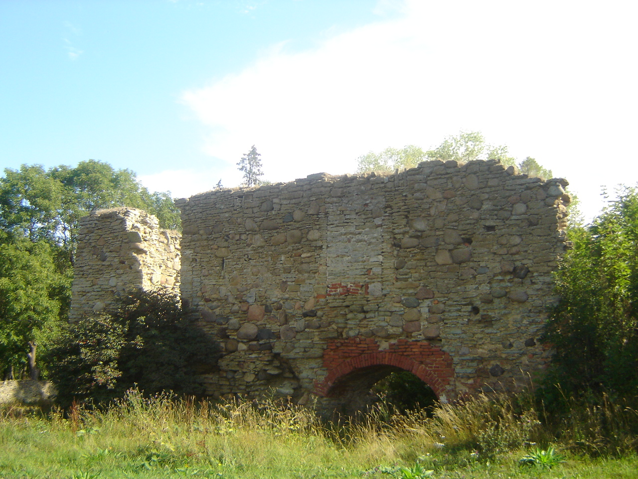 Linnuse müürid